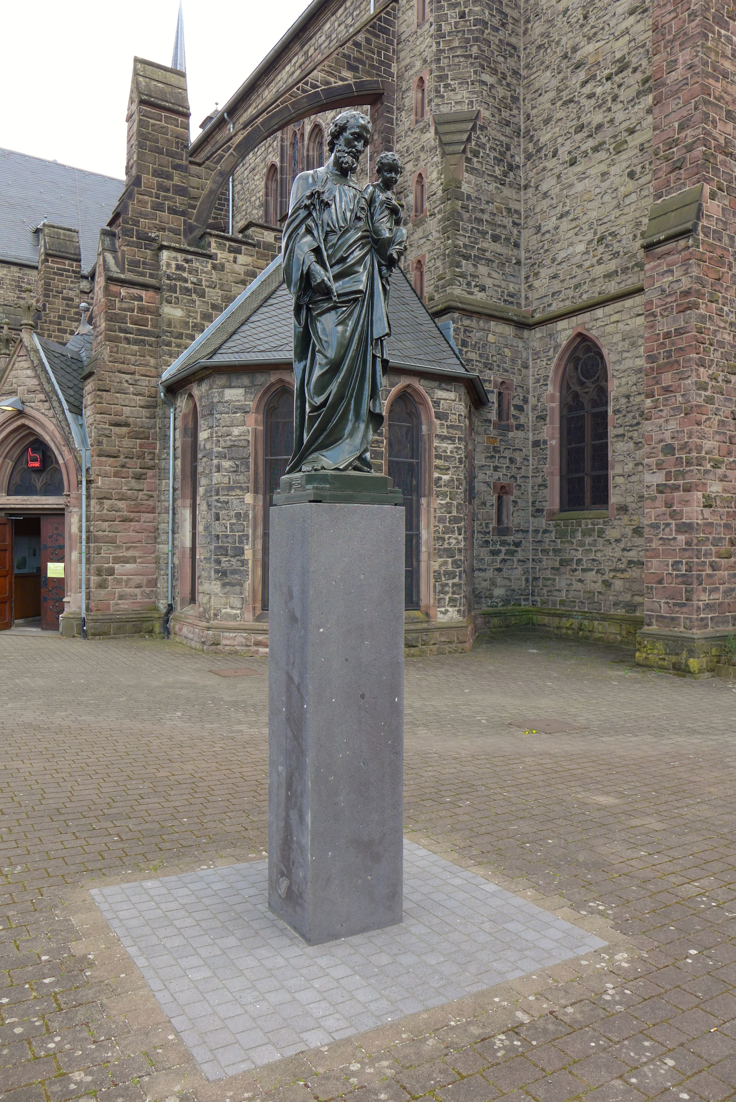 St. Josef (Saarbrücken), St.-Josef-Stele